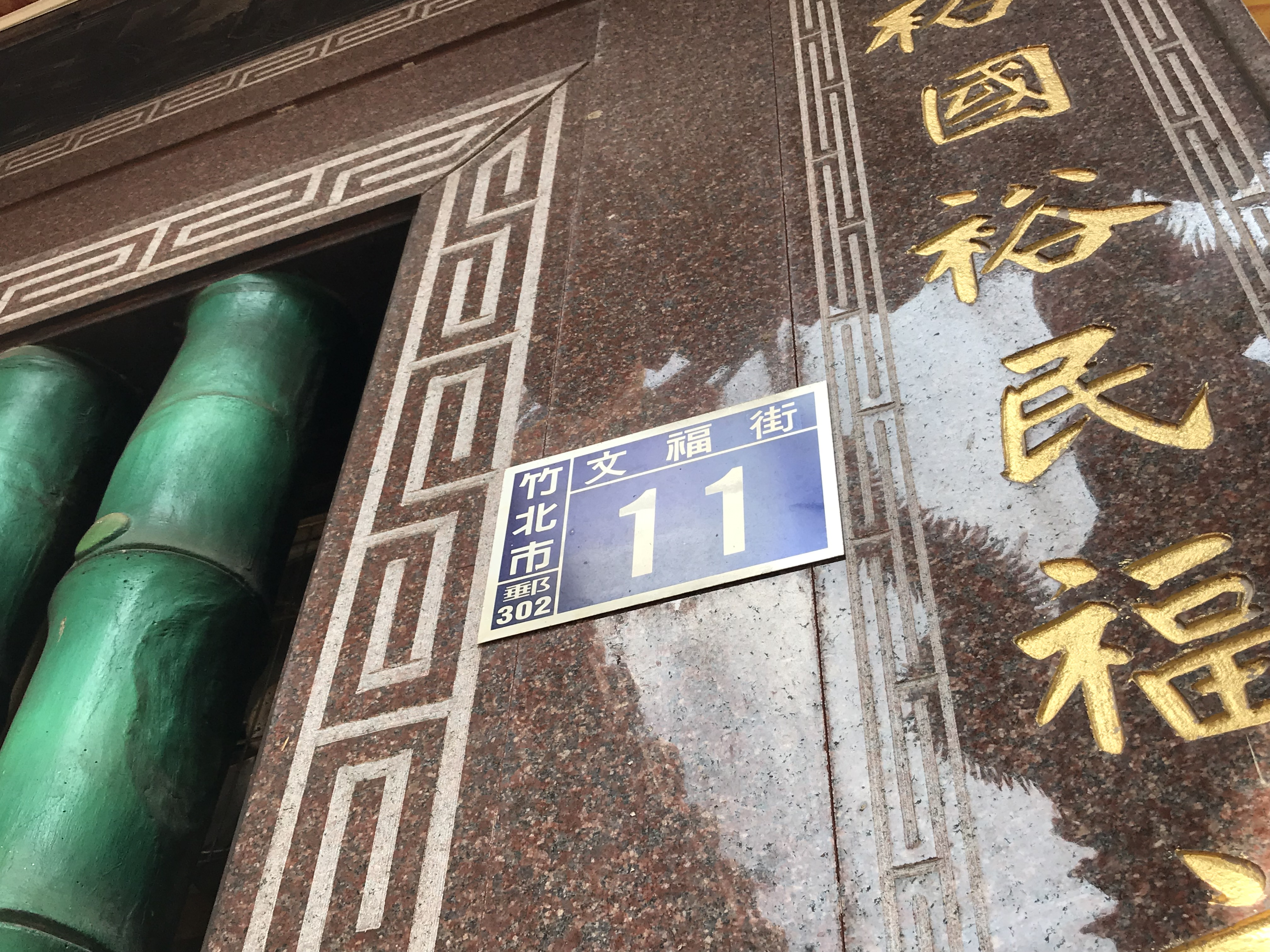 中文（台灣）: 文化福德宮門牌